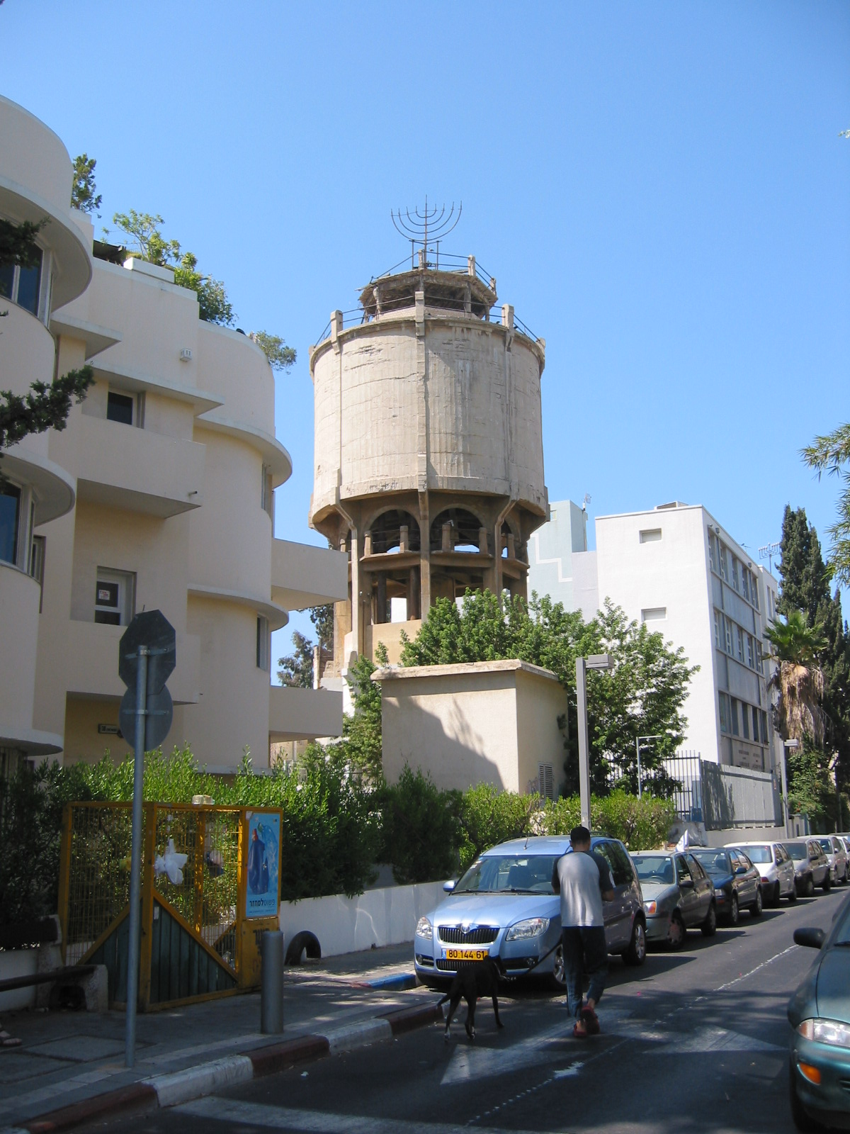 Water tower in Maz"e St. - Ehad Haam St.